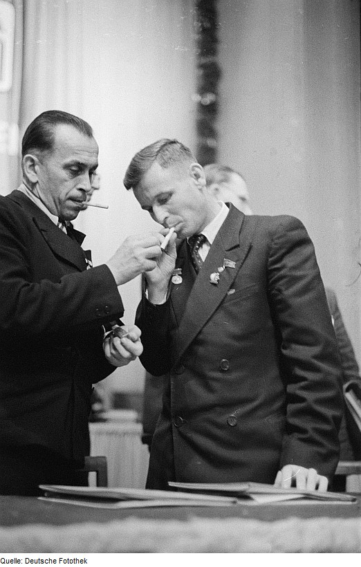 Original image description from the Deutsche Fotothek Pawel Bykow und Erich Wirth